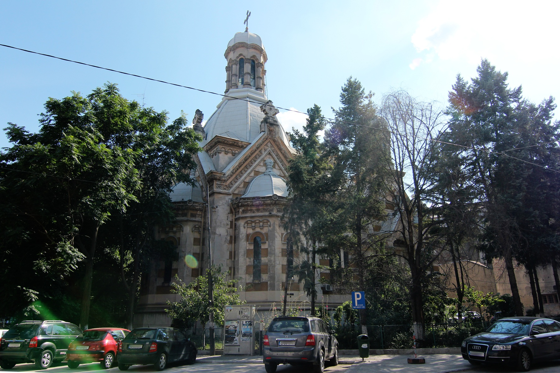 Biserica Amzei